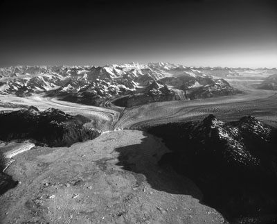 Columbia Glacier, Alaska